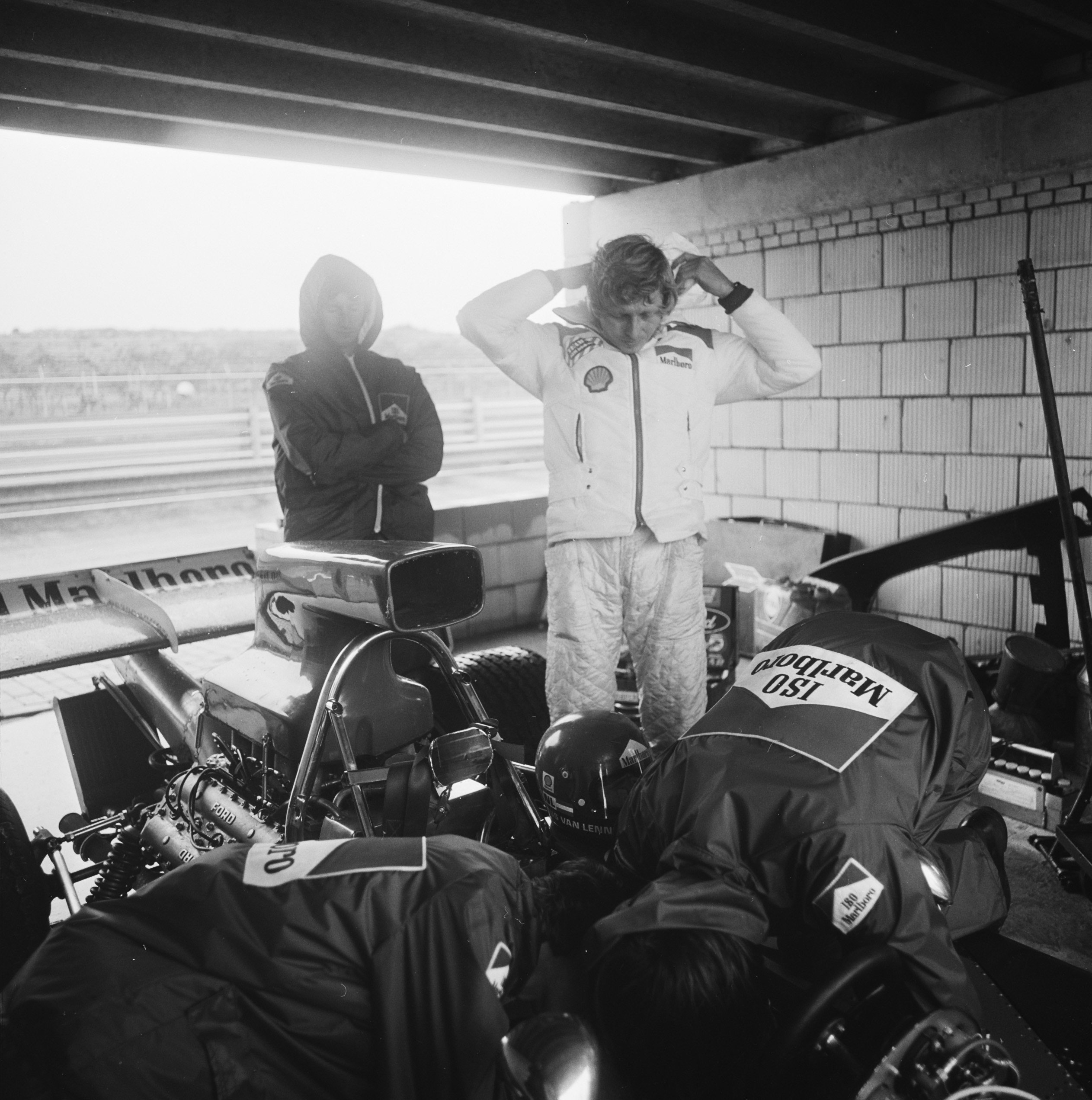 Gijs van Lennep in de pitbox